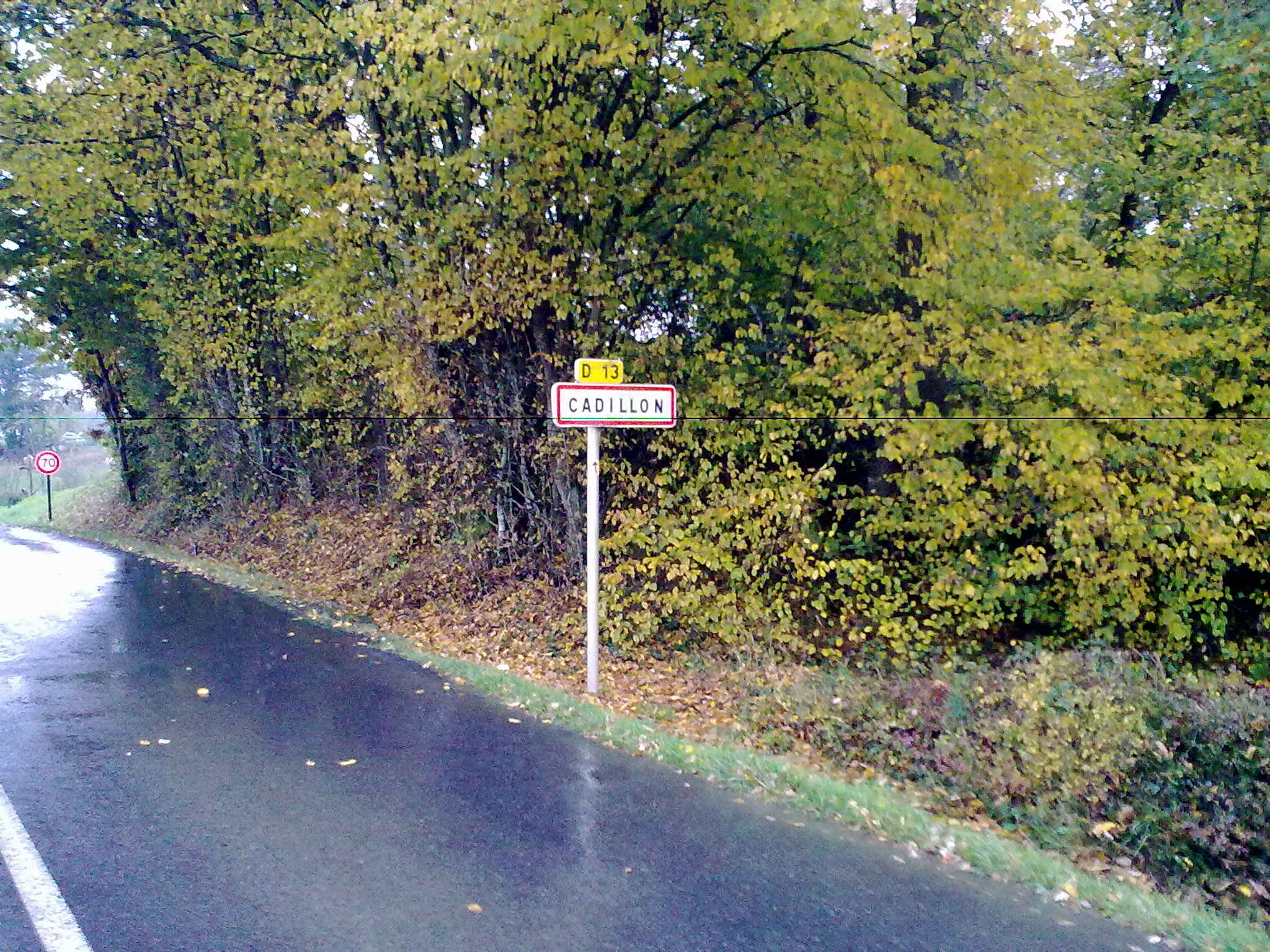 Cadillon